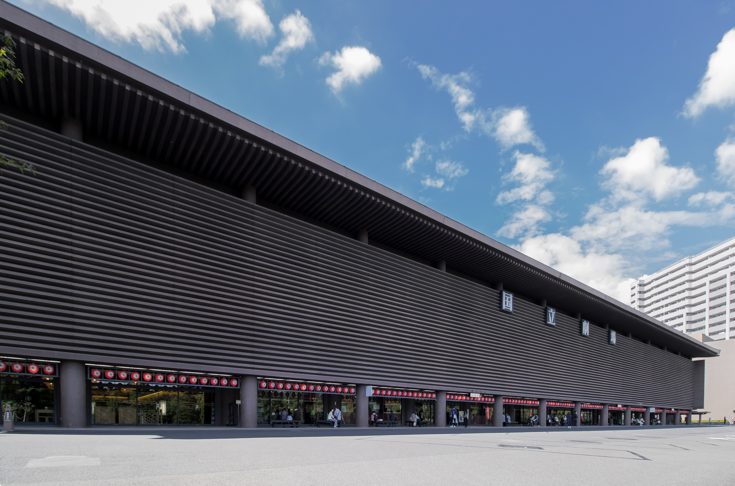 国立劇場（東京都千代田区）。